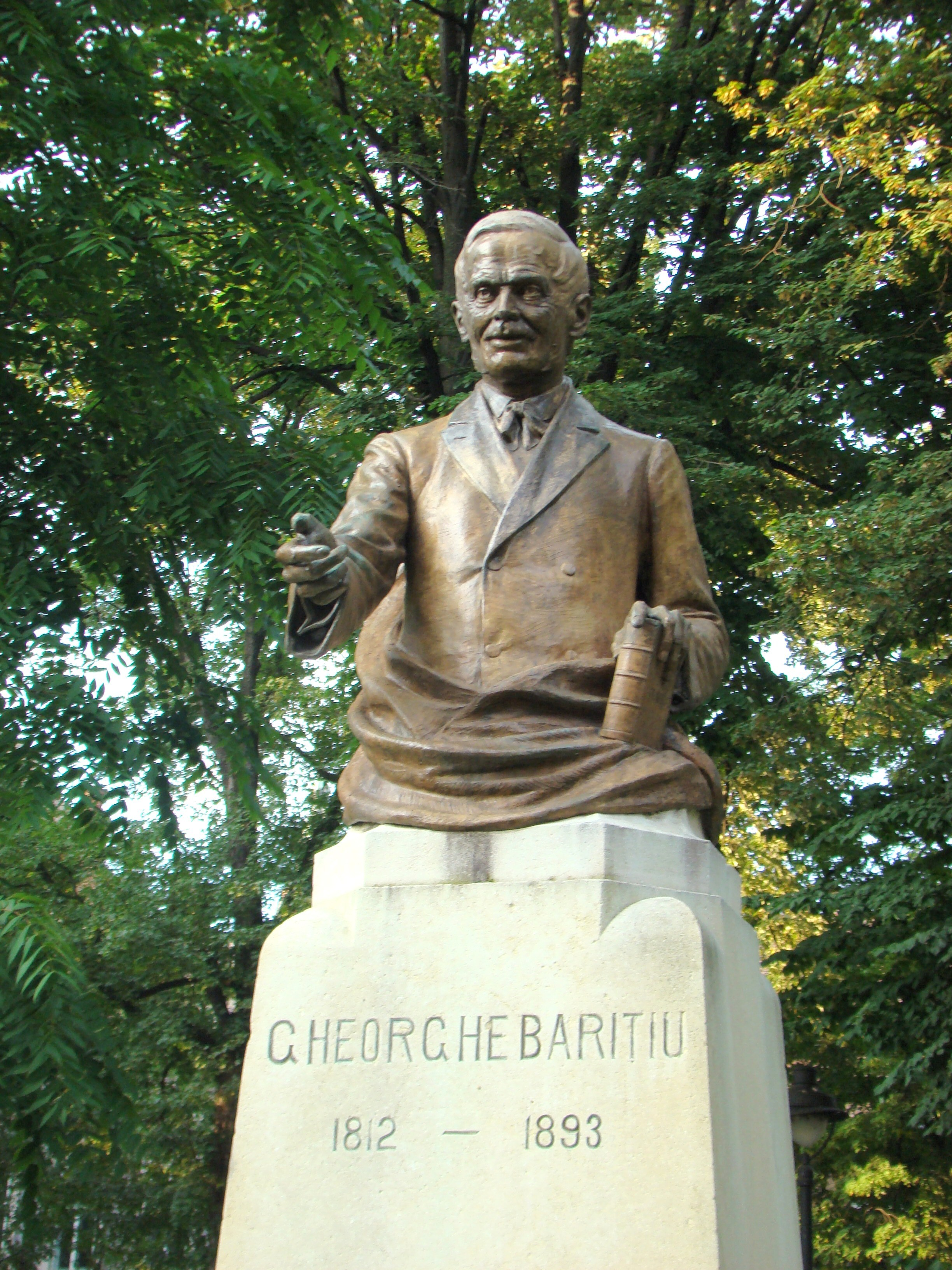 Bustul lui George Barițiu din Parcul Astra, Sibiu